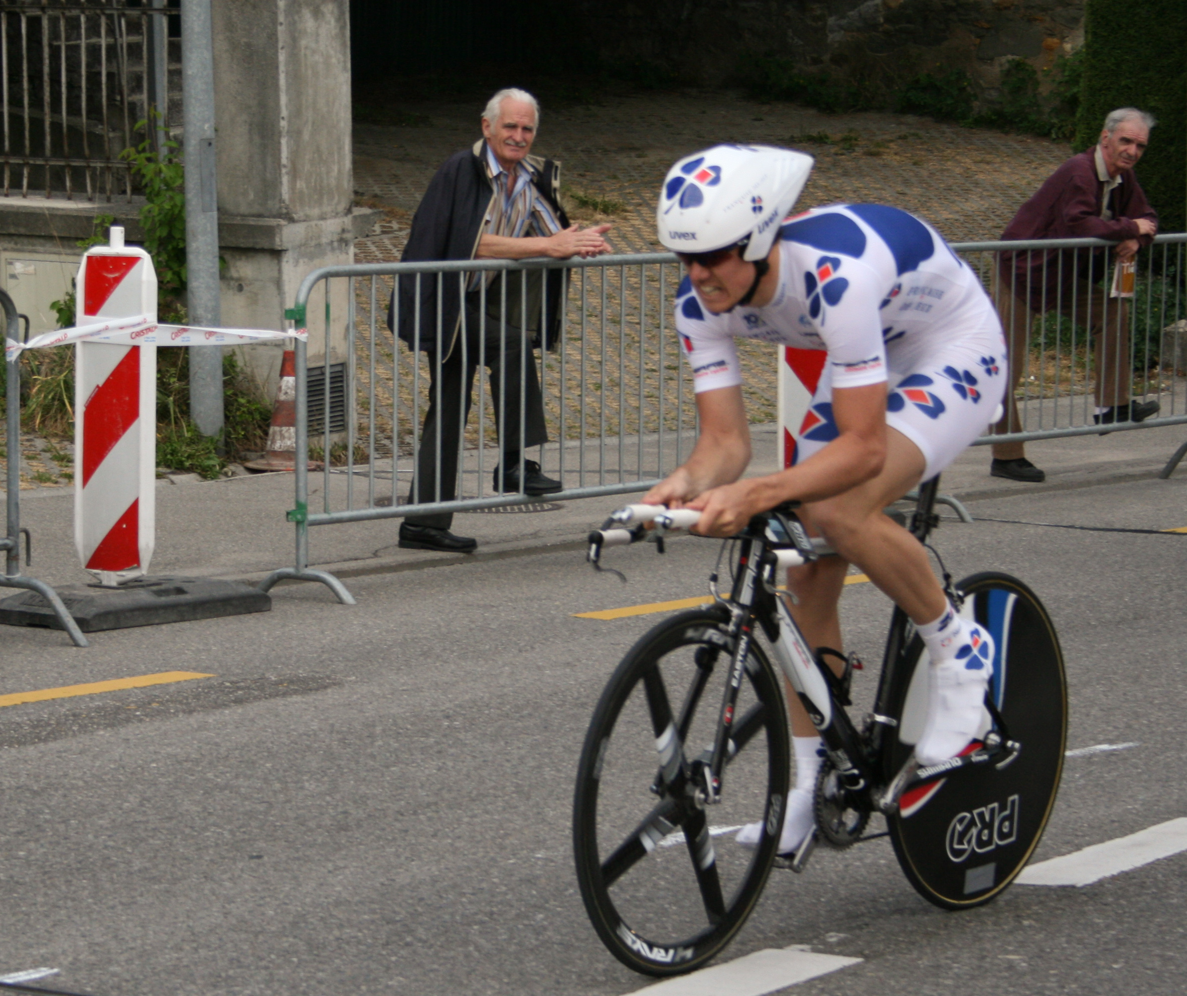 Timothy Gudsell prologue du Tour de Romandie 2007